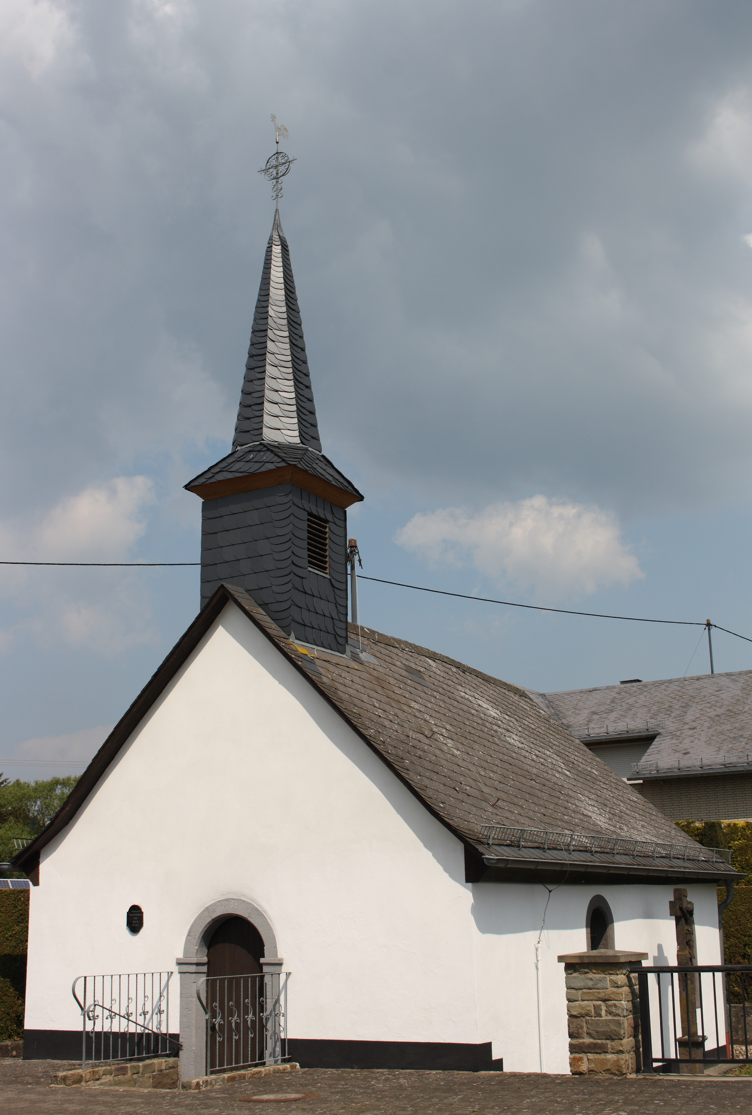 Katholische Filialkirche St. Blasius und Wendelinus in Brücktal